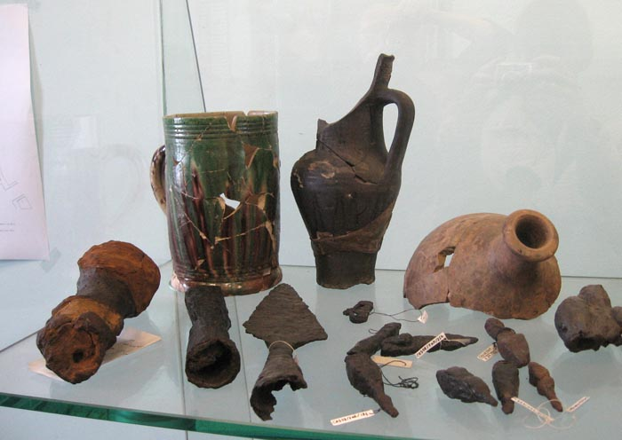 Находки из раскопок крепостей Ниеншанц и Ландскрона на Охтинском мысу. Раскопки Санкт-Петербургской археологической экспедиции Северо-западного научно-исследовательского института культурного и природного наследия.